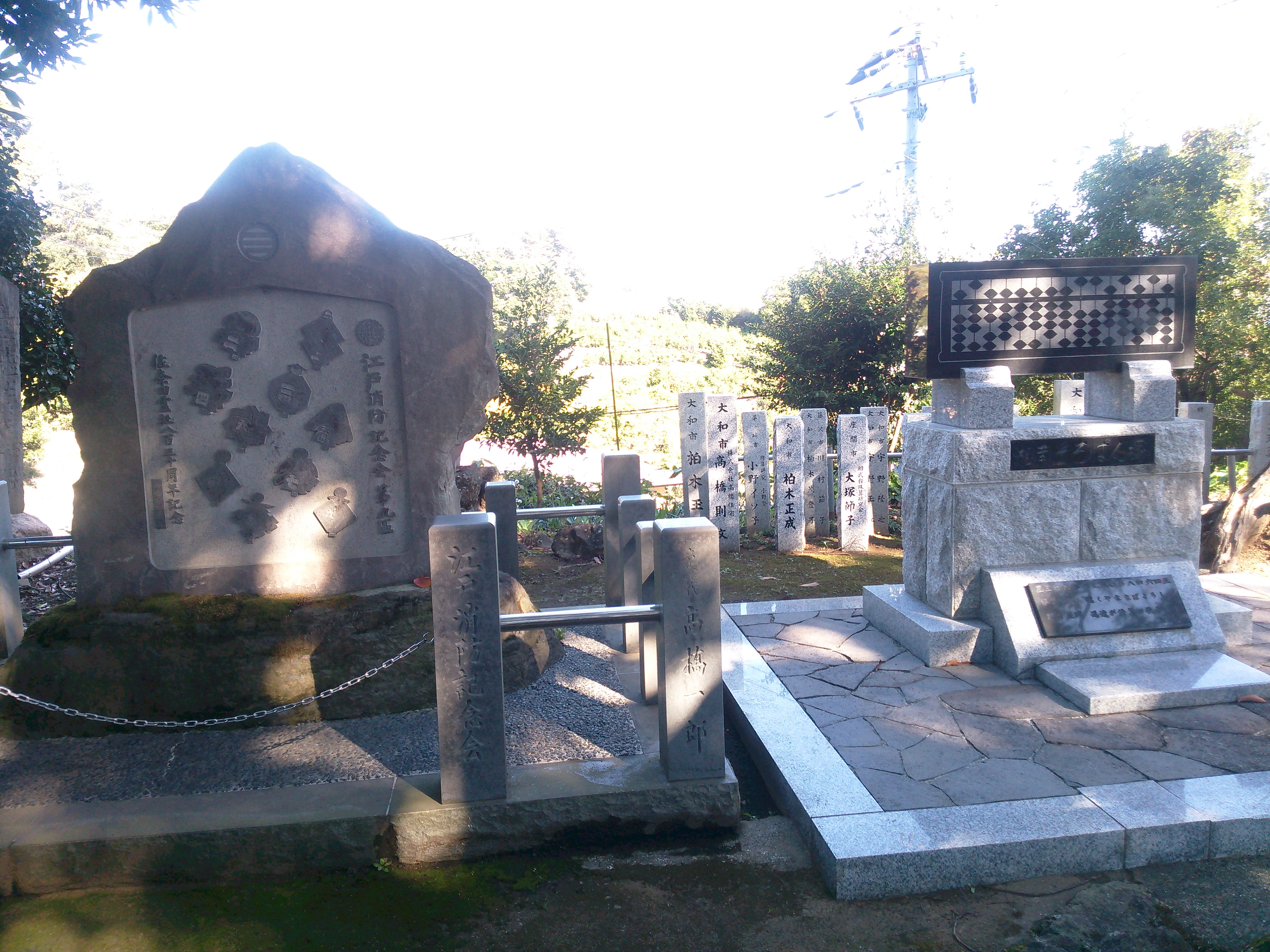 神奈川県小田原市、佐奈田霊社、江戸消防記念碑とそろばん塚